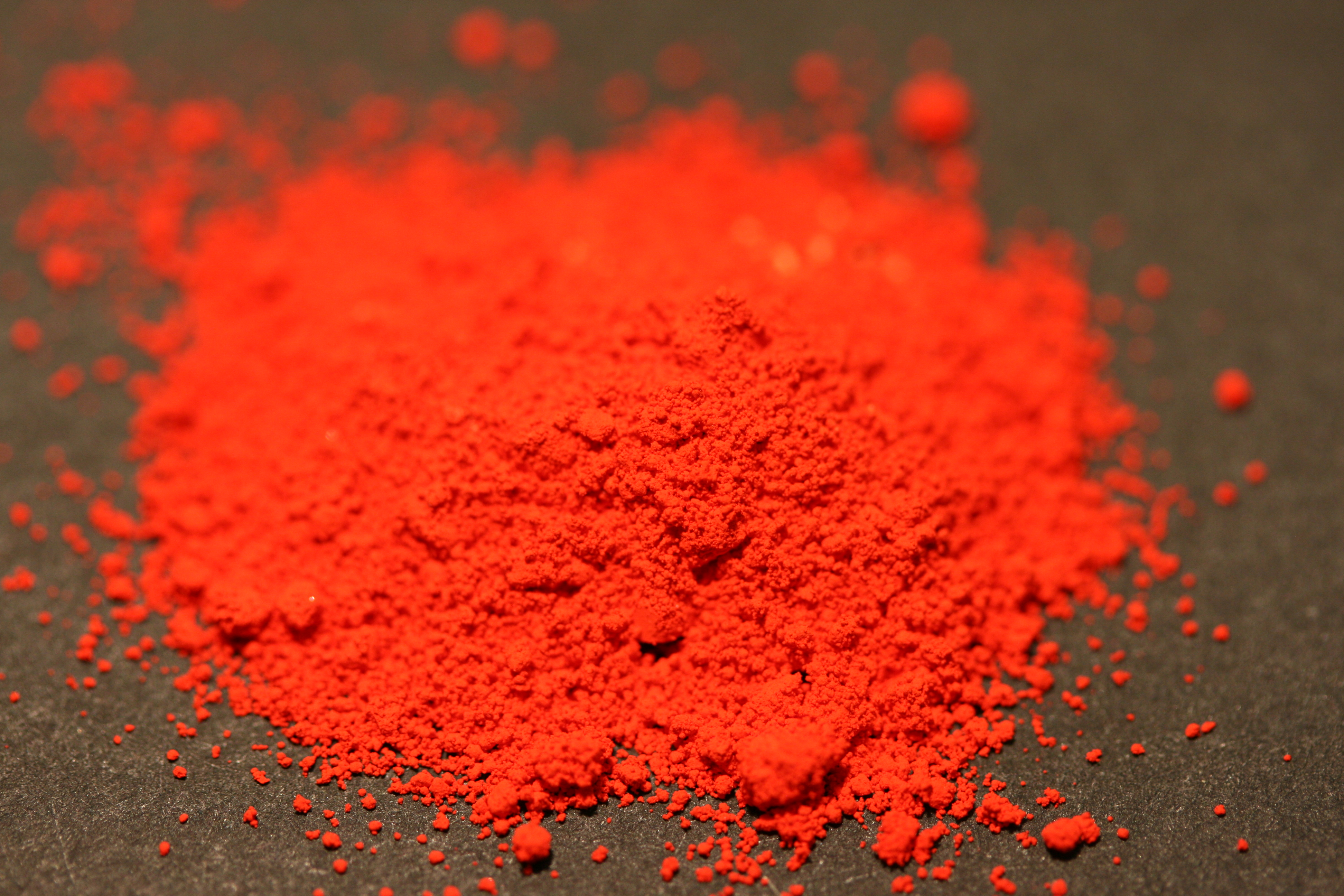 Kadmiumrot